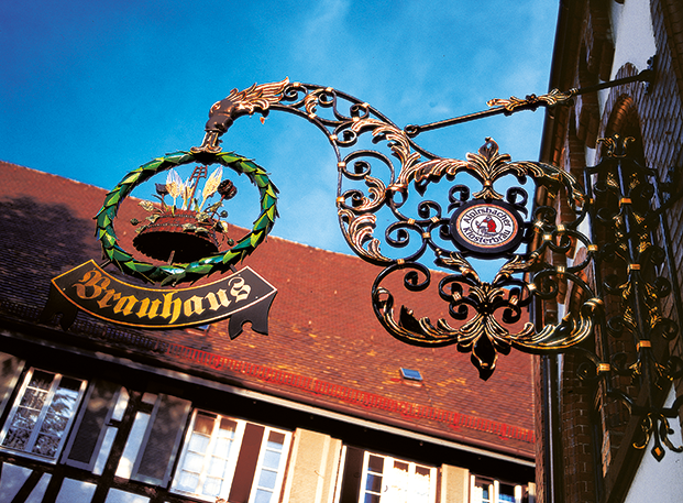 Als ausgewiesene Spezialitätenbrauerei kann die Privatbrauerei Alpirsbacher Klosterbräu, mit Sitz in der Klosterstadt Alpirsbach im Schwarzwald, auf eine ruhmvolle Tradition und eine ausgewiesene Braukunst zurückblicken. Die Brauerei wird bereits in der 4. Genration als Familienunternehmen von Carl W. Glauner geführt.